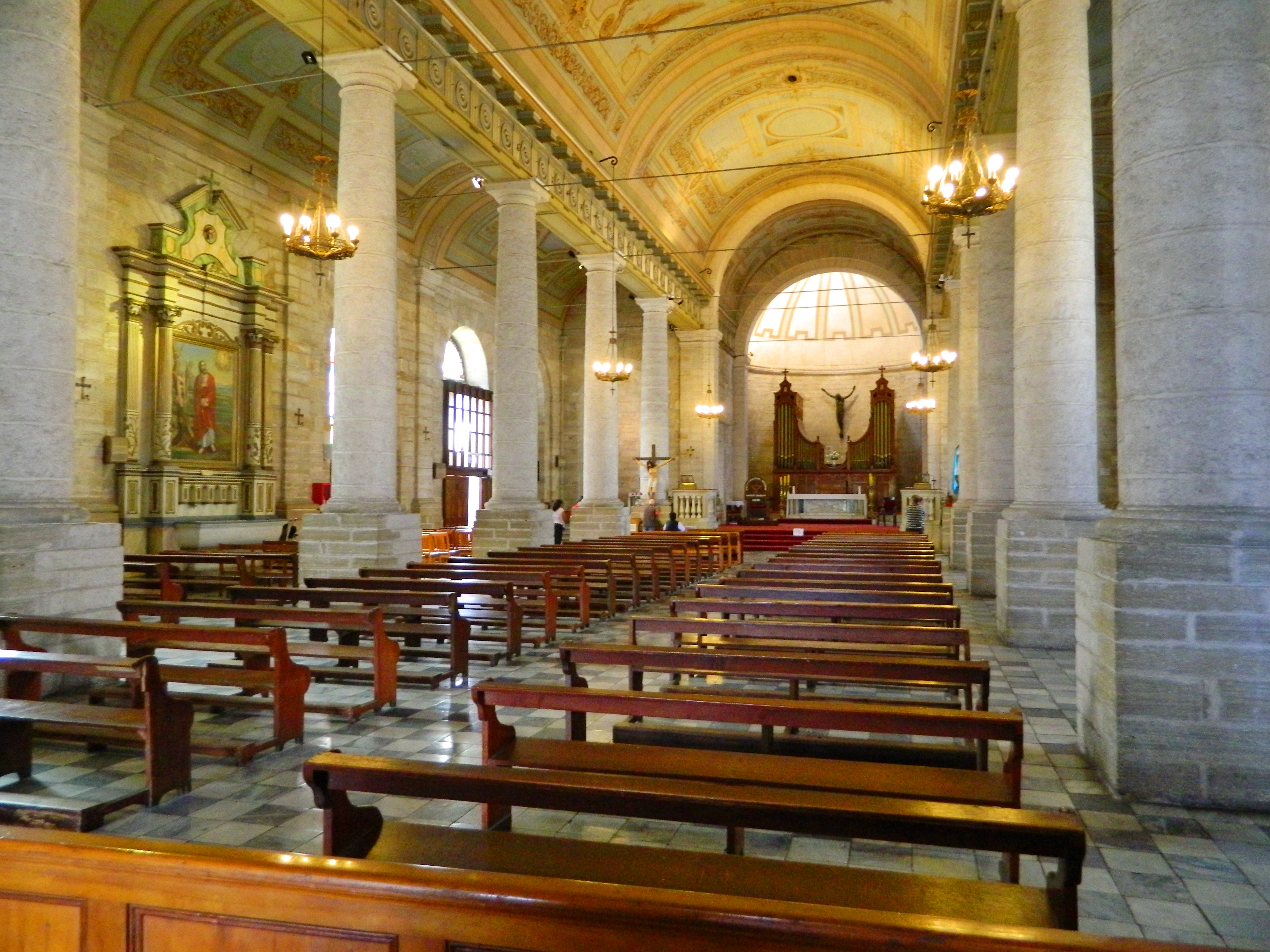 Catedral de La Serena This is a photo of a national monument in Chile: 344